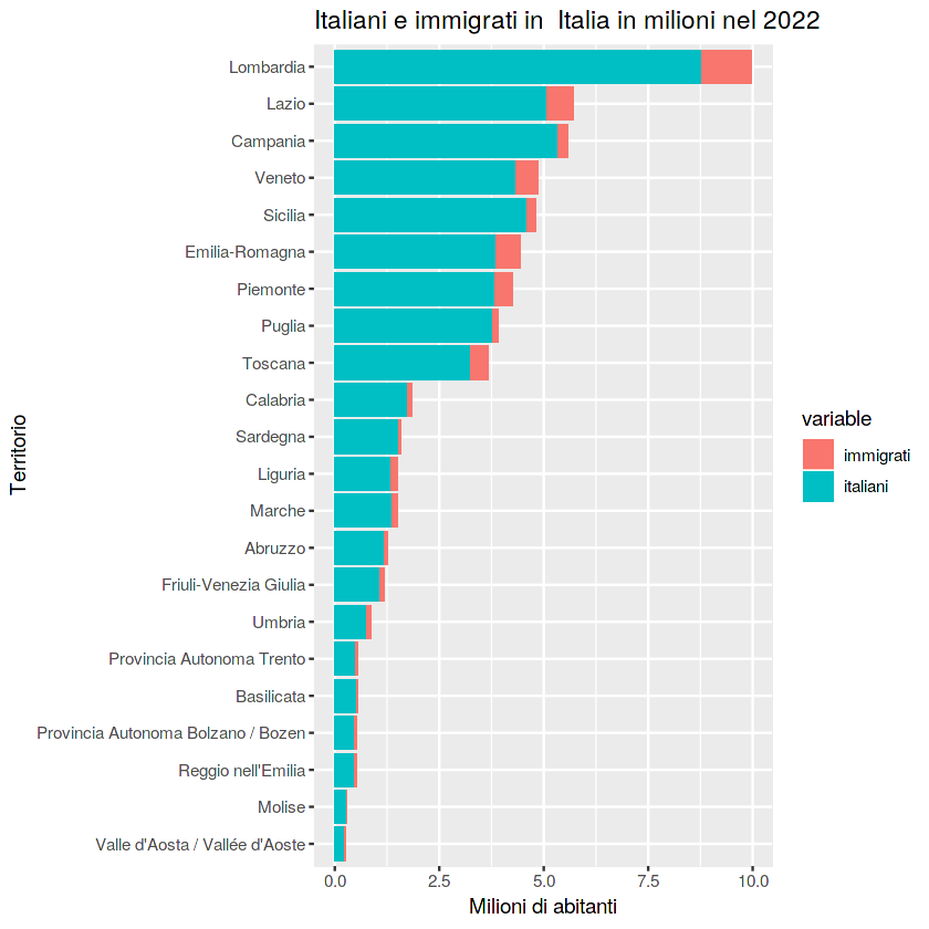 Grafico realizzato tramite dati Istat con il programma RStudio